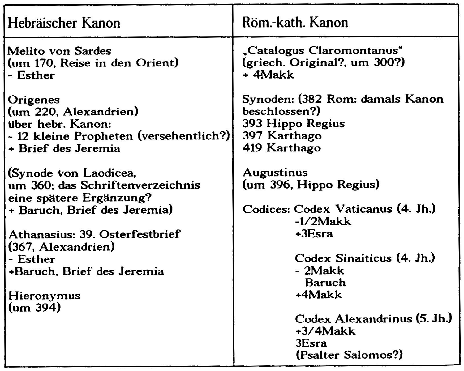 Schaubild zur Entwicklung des christlichen Kanons des Alten Testaments vom 2. bis zum 5. Jahrhundert